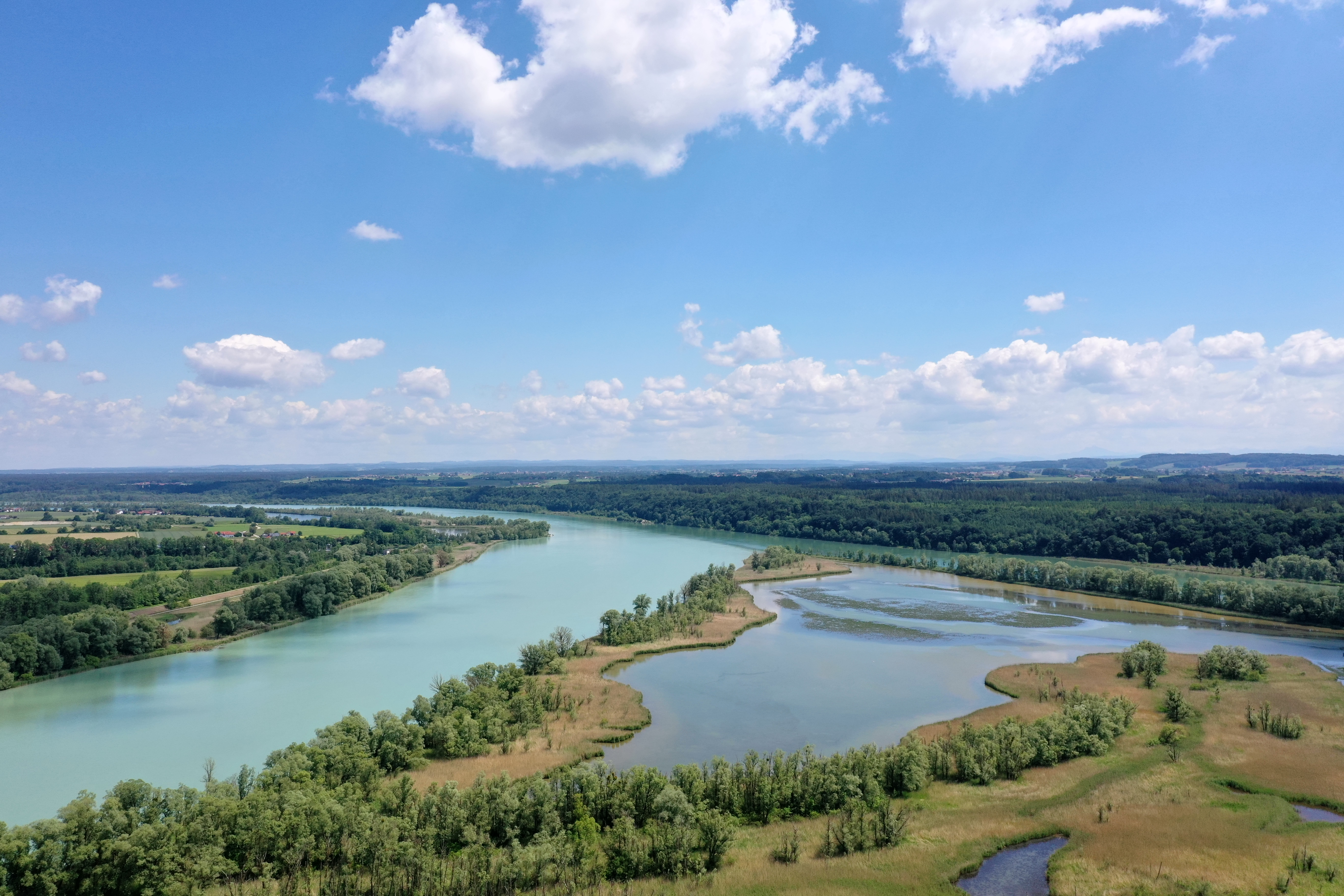 Der Innspitz ist das dreieckige Gebiet an der Mündung der Salzach in den Inn zwischen beiden Flüssen. Er steht als Teil des Landschaftsschutzgebietes Salzachtal unter Naturschutz und ist Teil des Europa-Vogelreservats Unterer Inn.